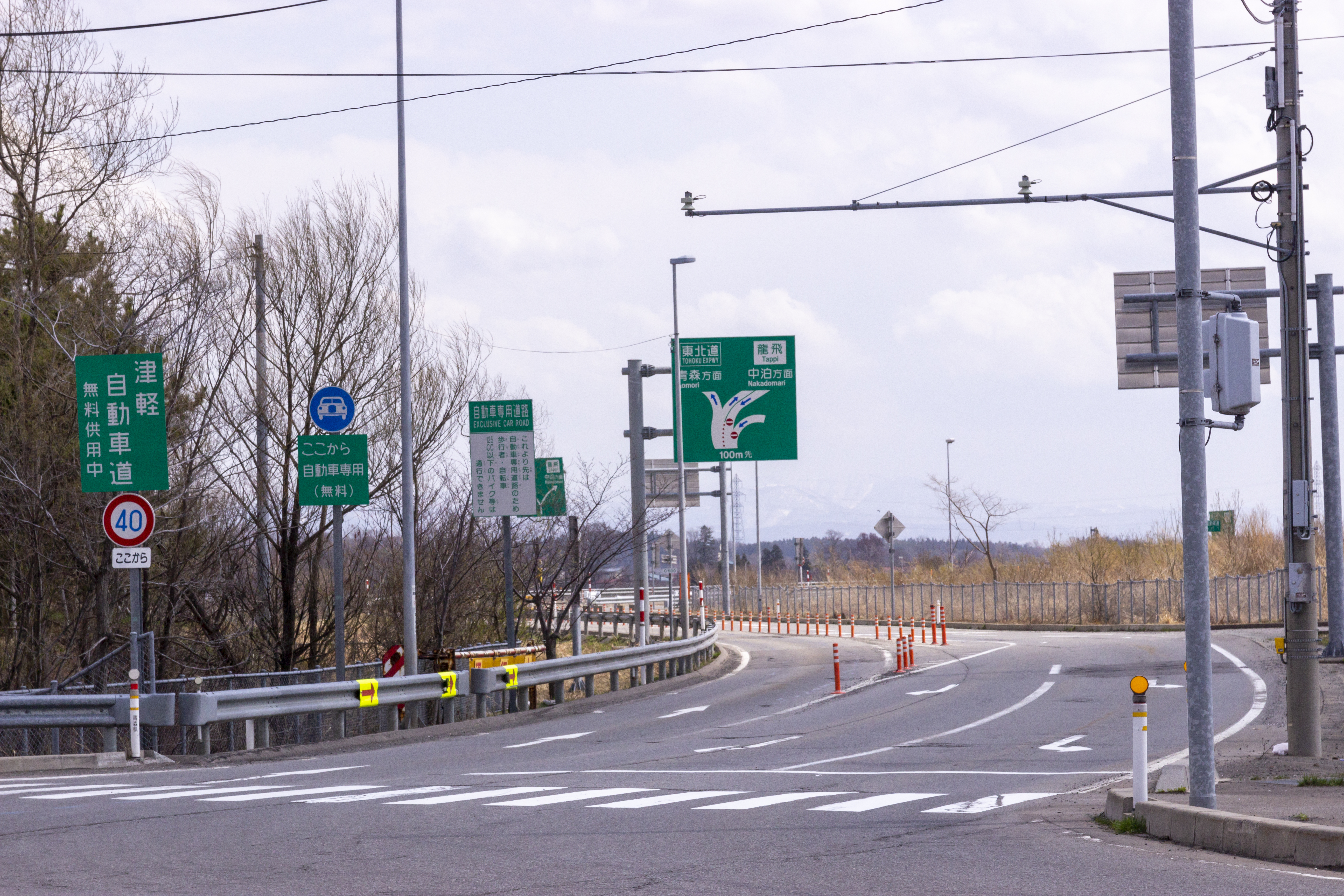 津軽自動車道 五所川原東IC 入口 一般道との結節点